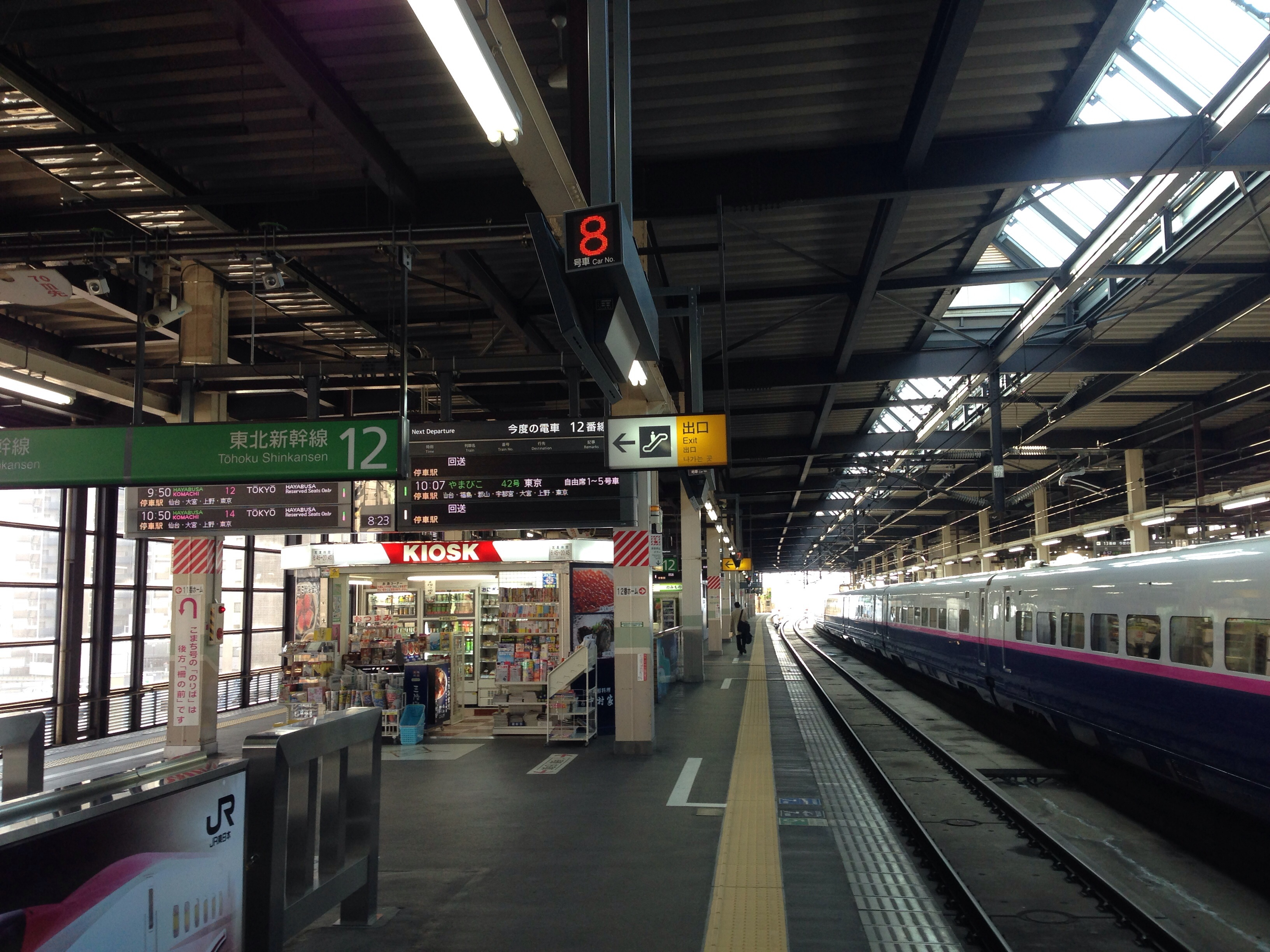 新幹線ホーム(2014年4月2日)